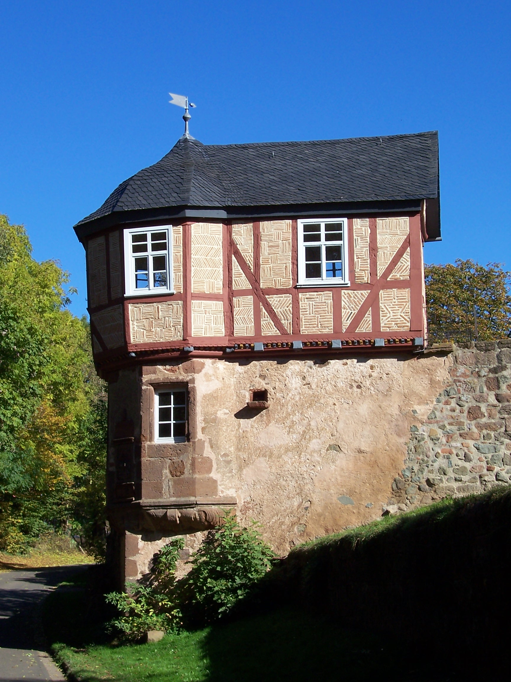 Rapunzelturm („Rapunzelhäuschen“, „Lusthäuschen“) in Wetter-Amönau, Landkreis Marburg-Biedenkopf, Hessen